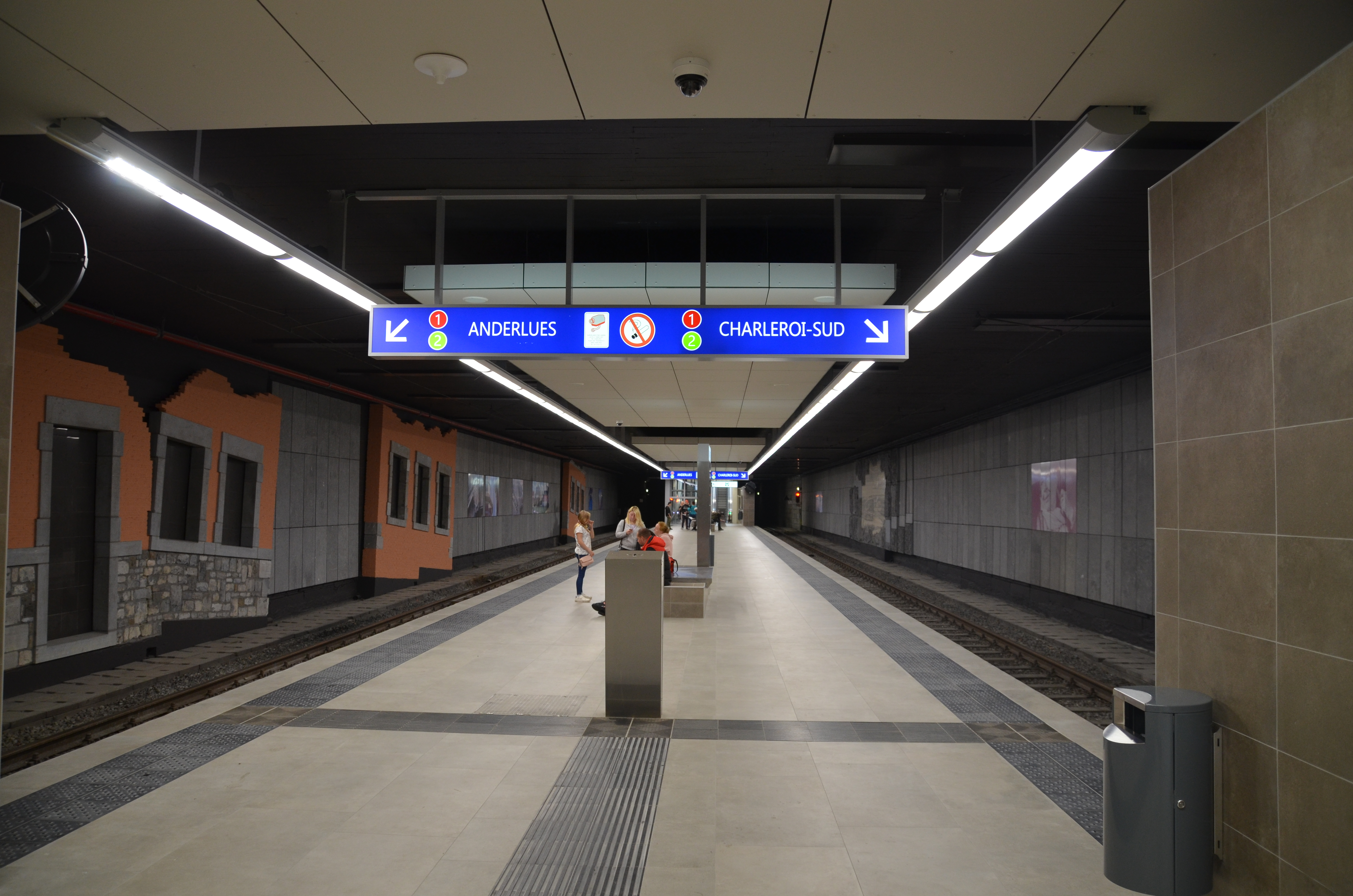 De Cartier (métro de Charleroi) - aménagement de 2019.